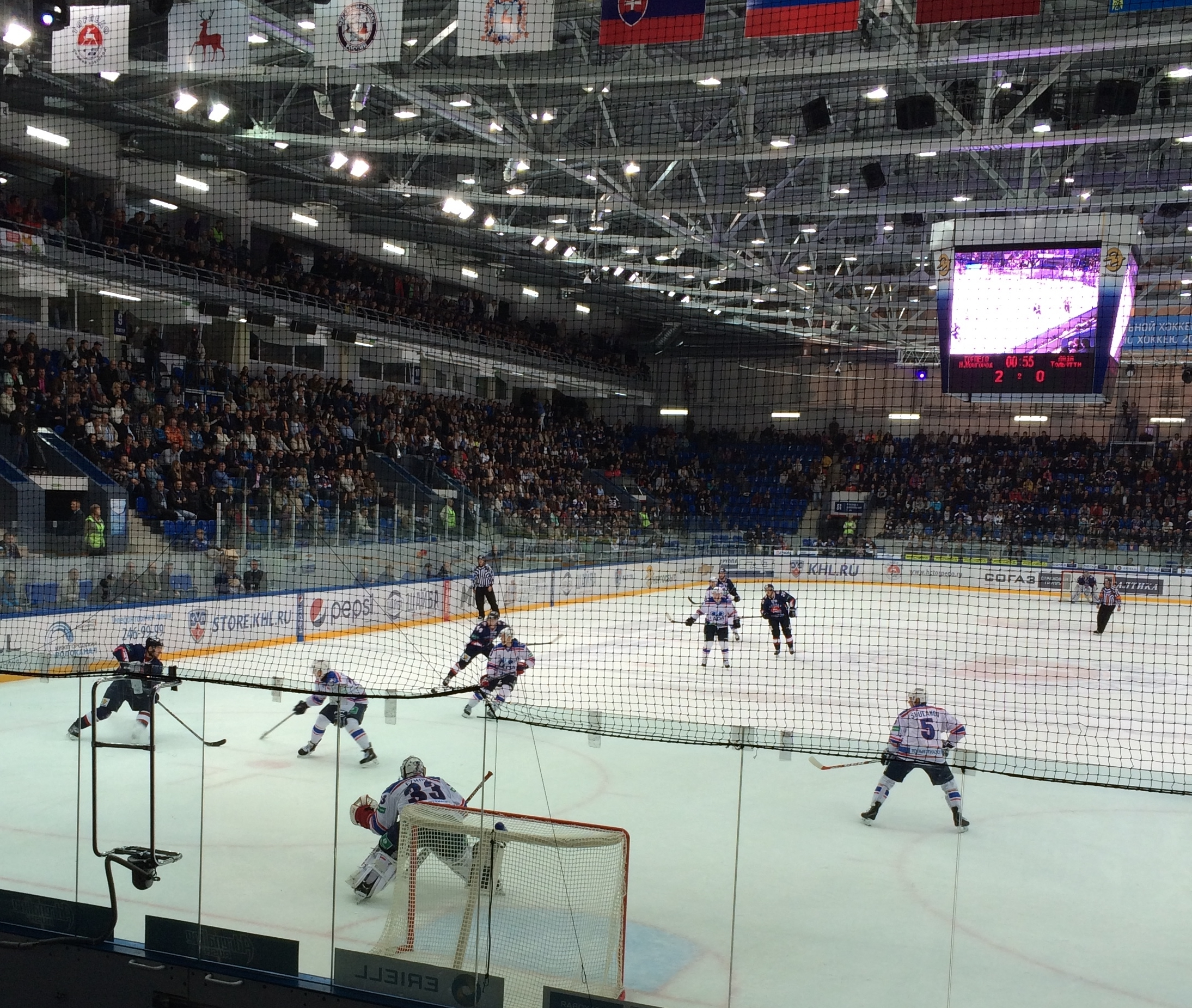 Игроки ХК «Торпедо» атакуют ворота ХК «Лада»